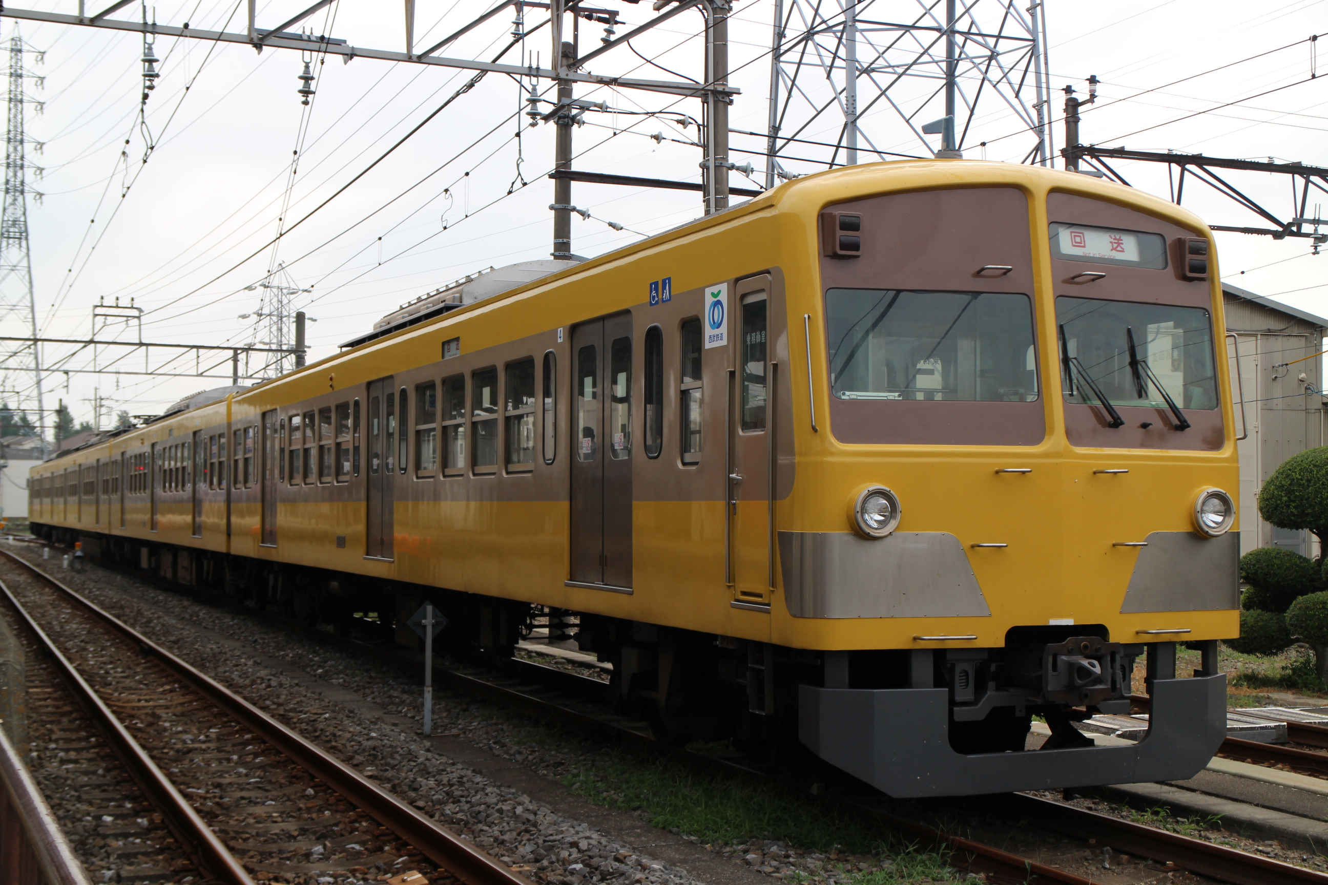 西武101系電車/登場時の塗装